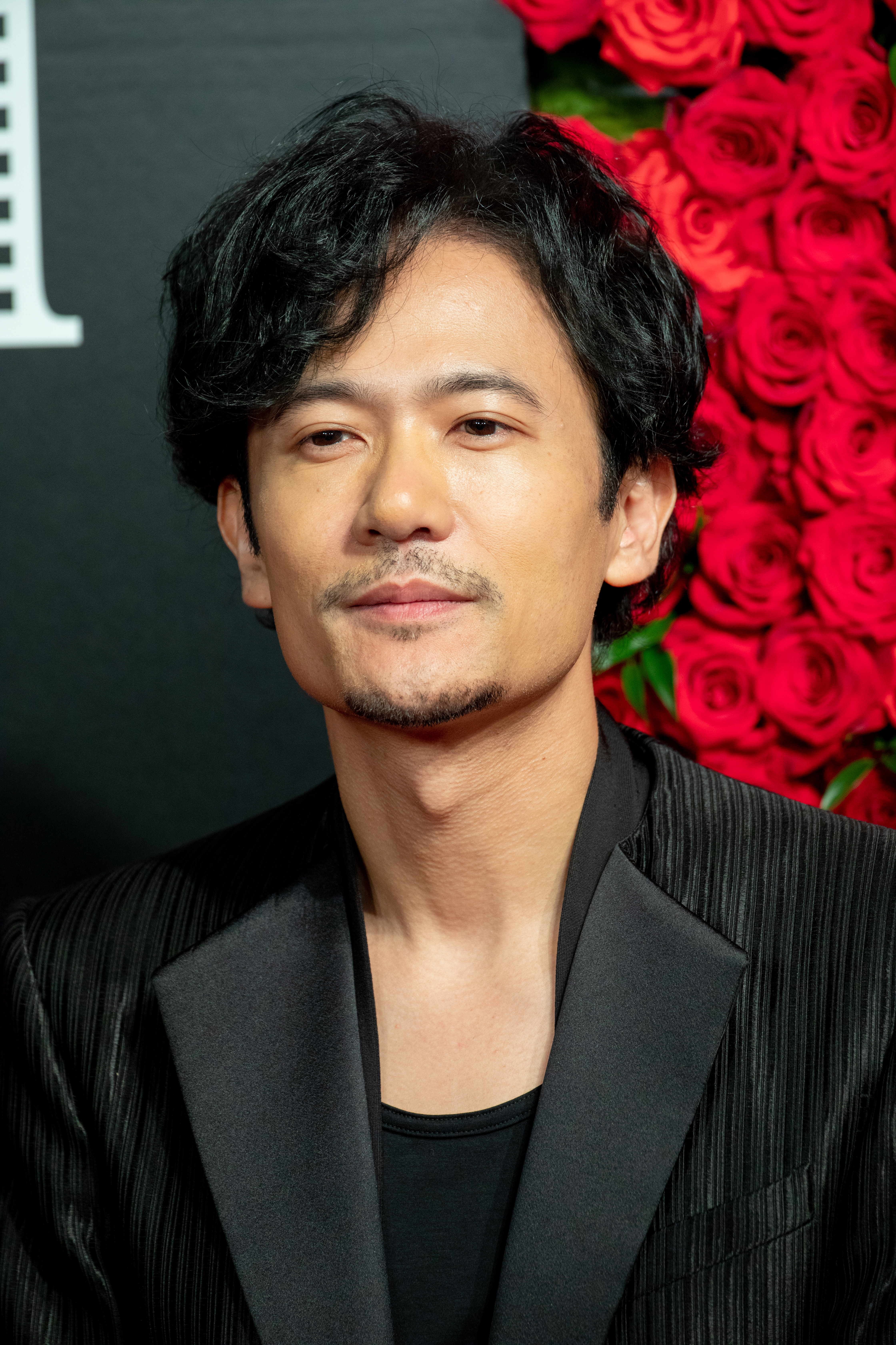 第30回 東京国際映画祭 オープニングセレモニー 稲垣吾郎 (半世界)